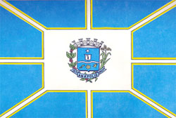 Bandeira de Anápolis